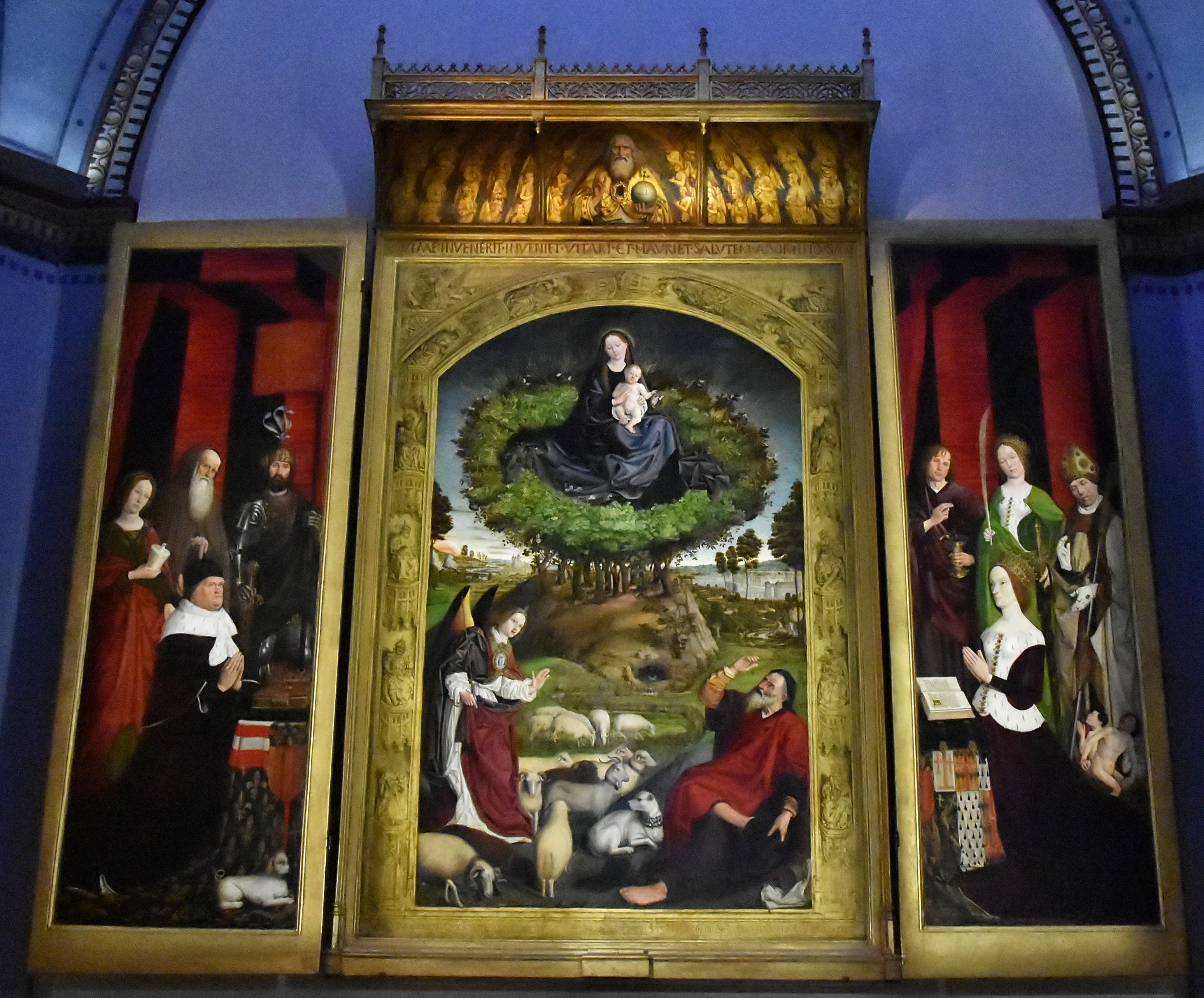 Nicolas Froment (1435-1486) Triptiek van het brandende braambos (1476) Kathedraal van Aix-en-Provence